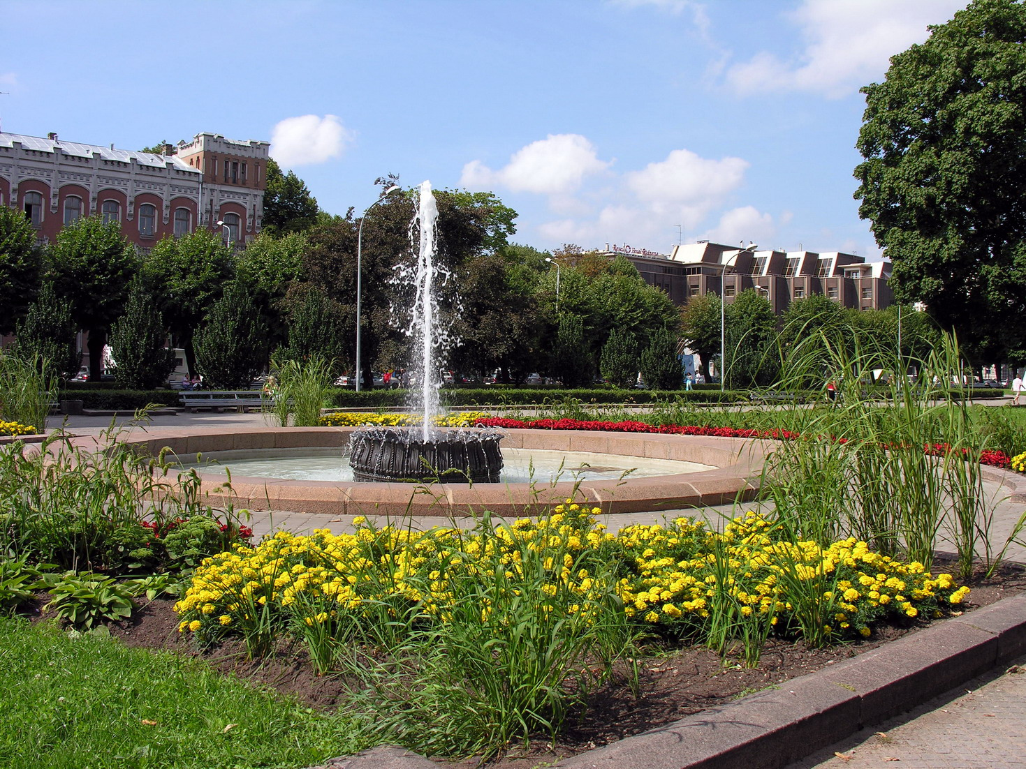 Žemaitėška: Rīga 2007-08-08